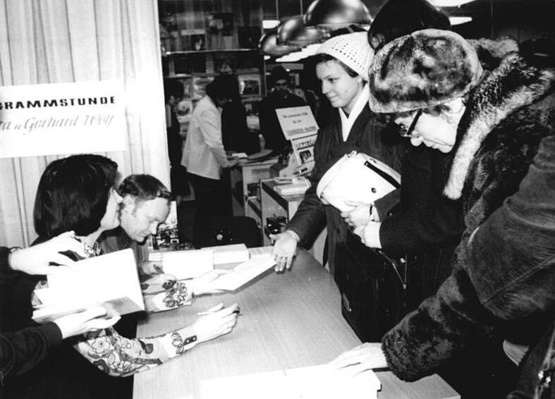 ADN-ZB Katschorowski 6.12.1973 Berlin: Autogrammstunde mit Christa und Gerhard Wolf. Gäste der 50. Veranstaltung der Reihe "Autogrammstunde-Buchpremiere" in der größten Berliner Buchhandlung, "Das Internationale Buch", waren am 6.12.73 die Schriftsteller Christa und Gerhard Wolf. Sie signierten für die zahlreichen Literaturfreunde ihr neuestes Buch "Till Eulenspiegel".